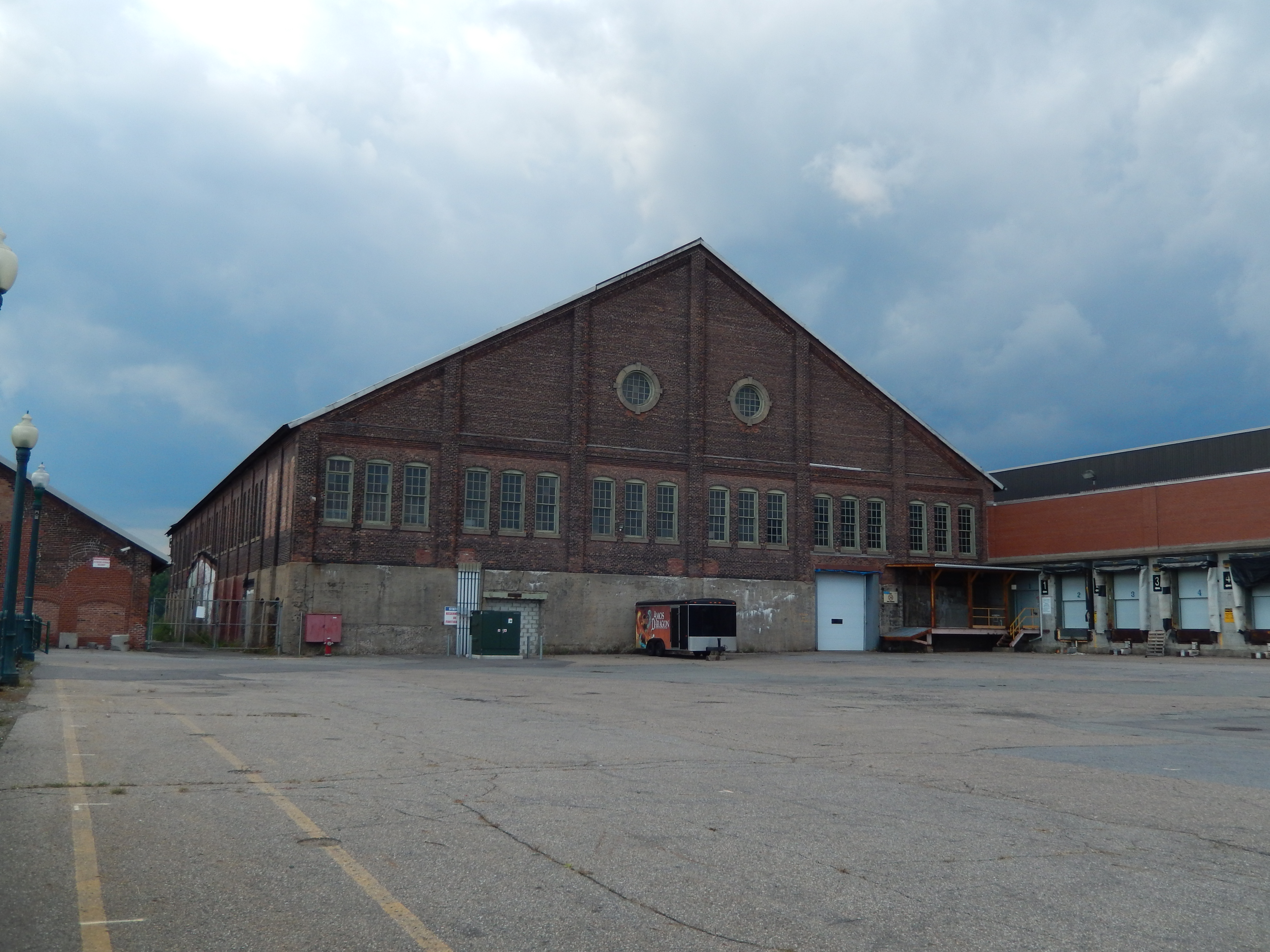 Bâtiment AL-15 de l'Ancienne aluminerie de Shawinigan.